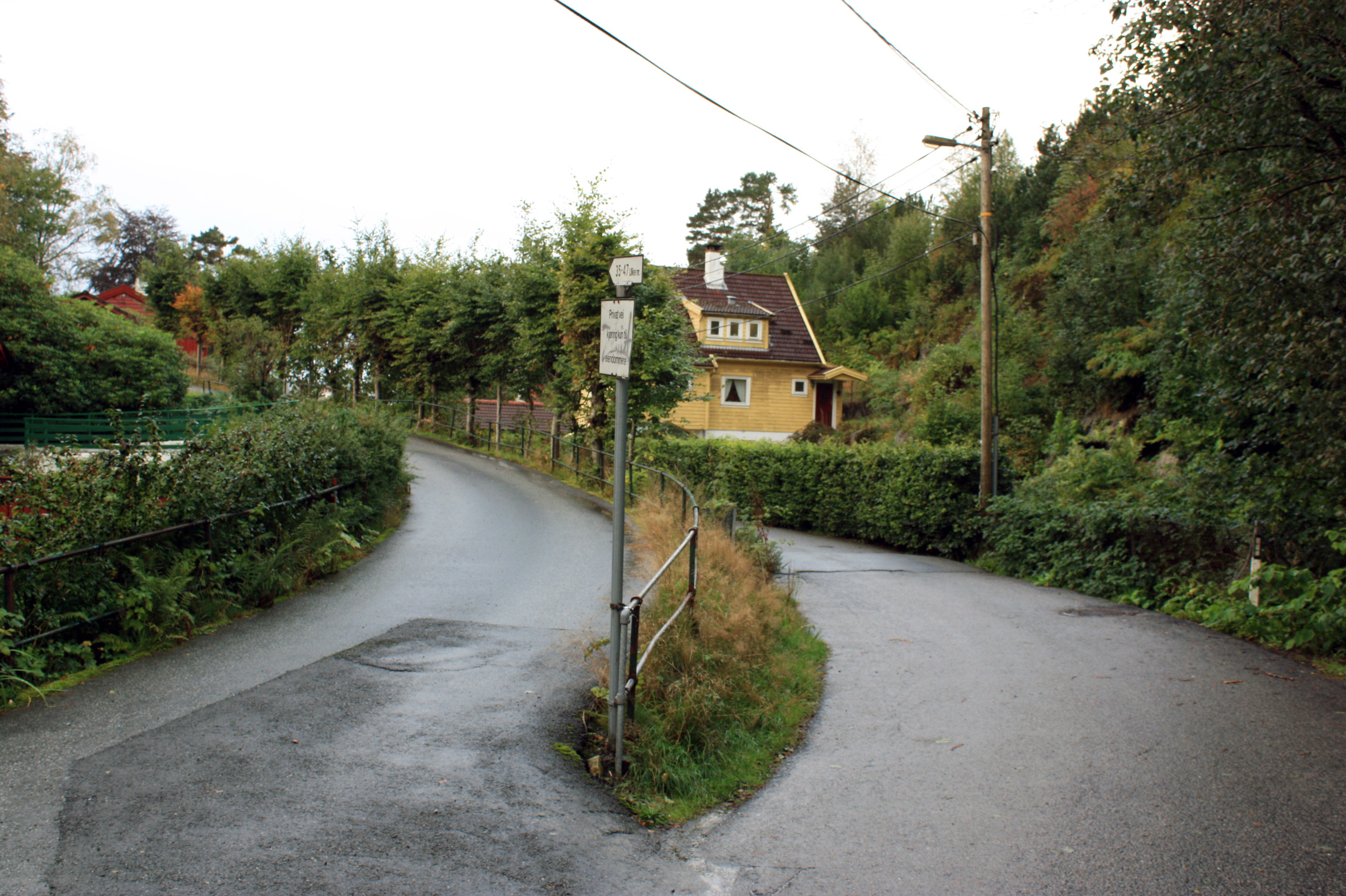 Ny-Paradis, Fana, Bergen.